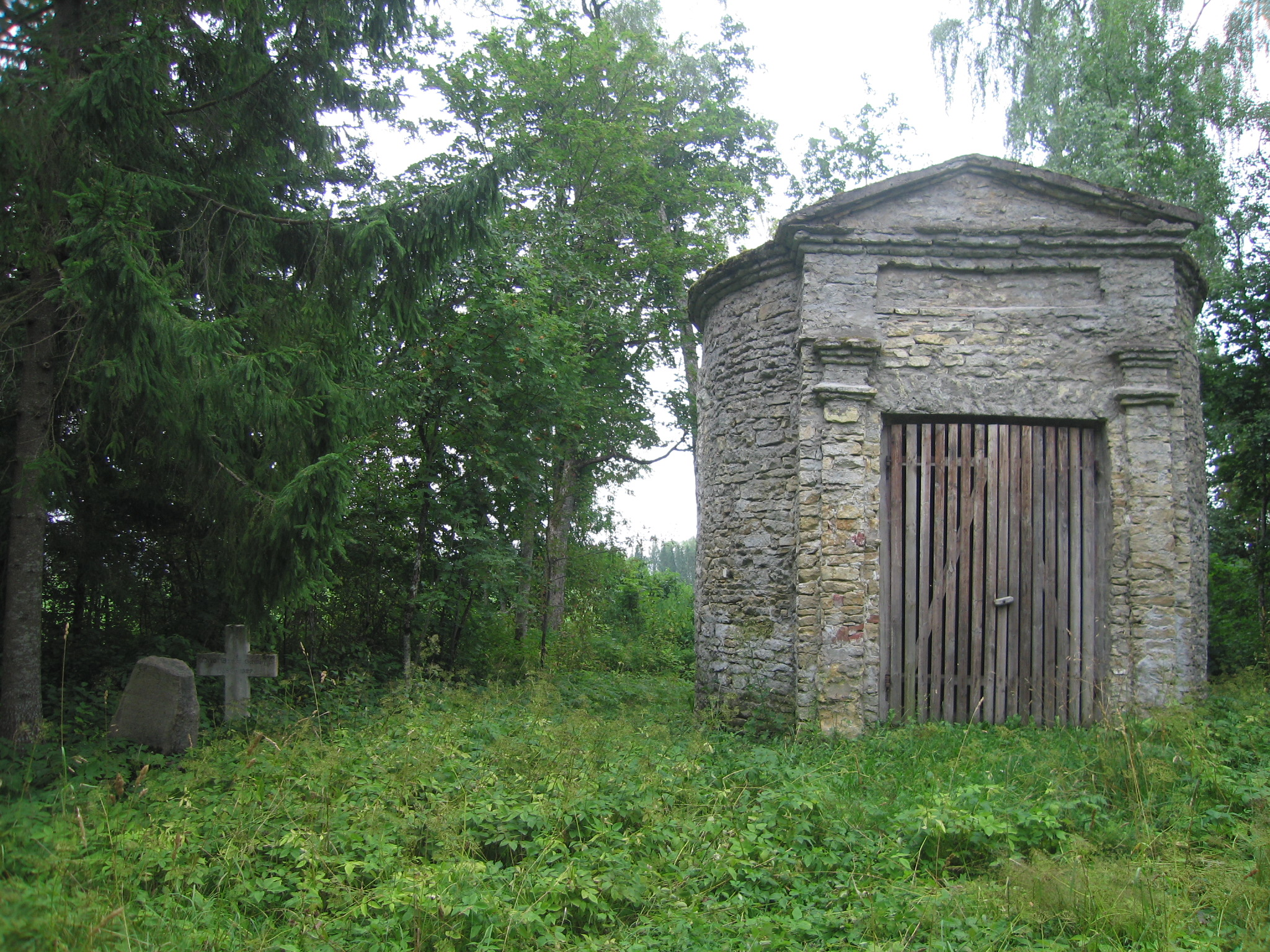 Hauatähised ja kabel.Foto: Robert Treufeldt, 9. august 2014